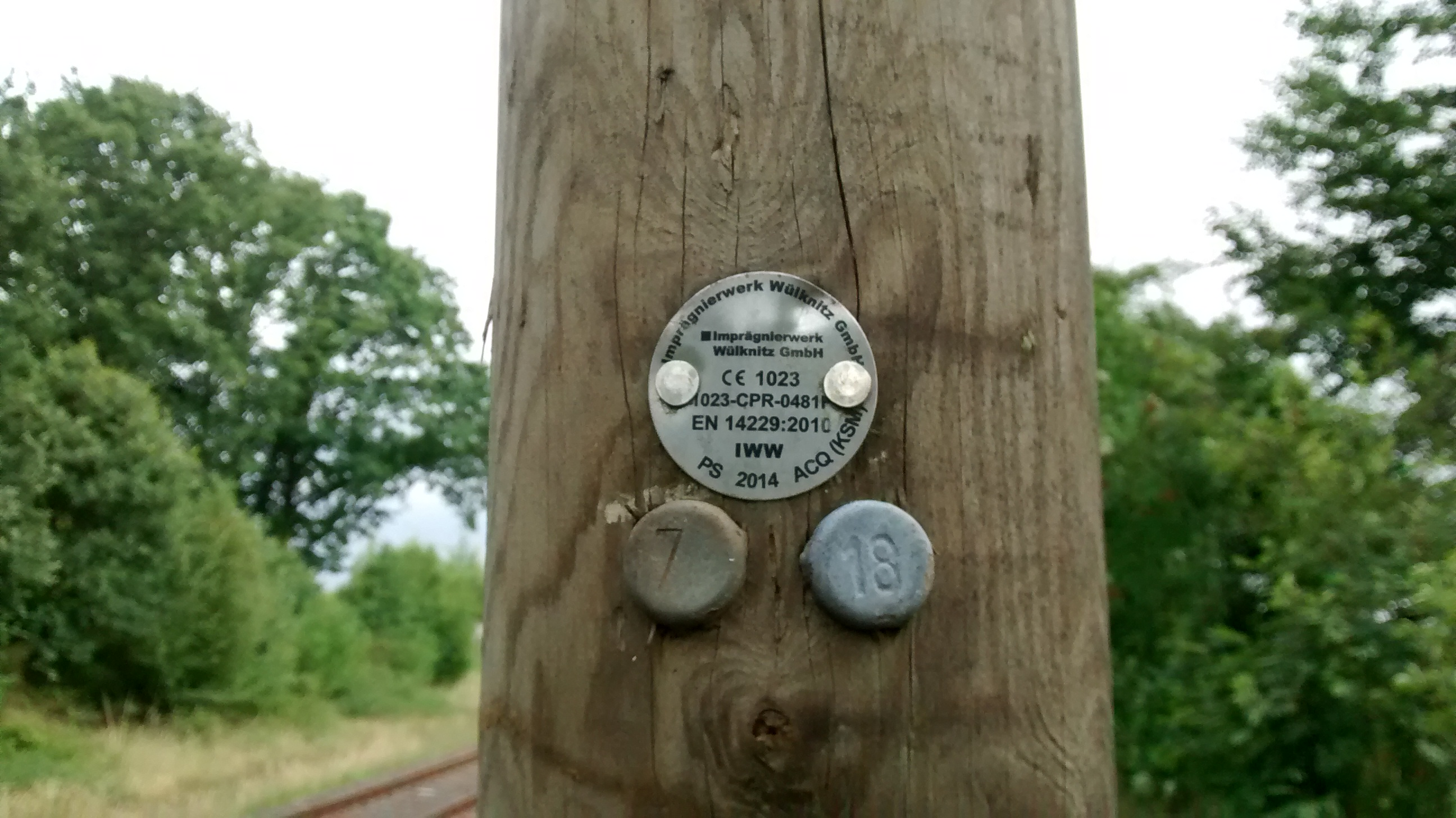 Plakette nach DIN EN 14229 an einem Mast einer Streckenfernsprechleitung